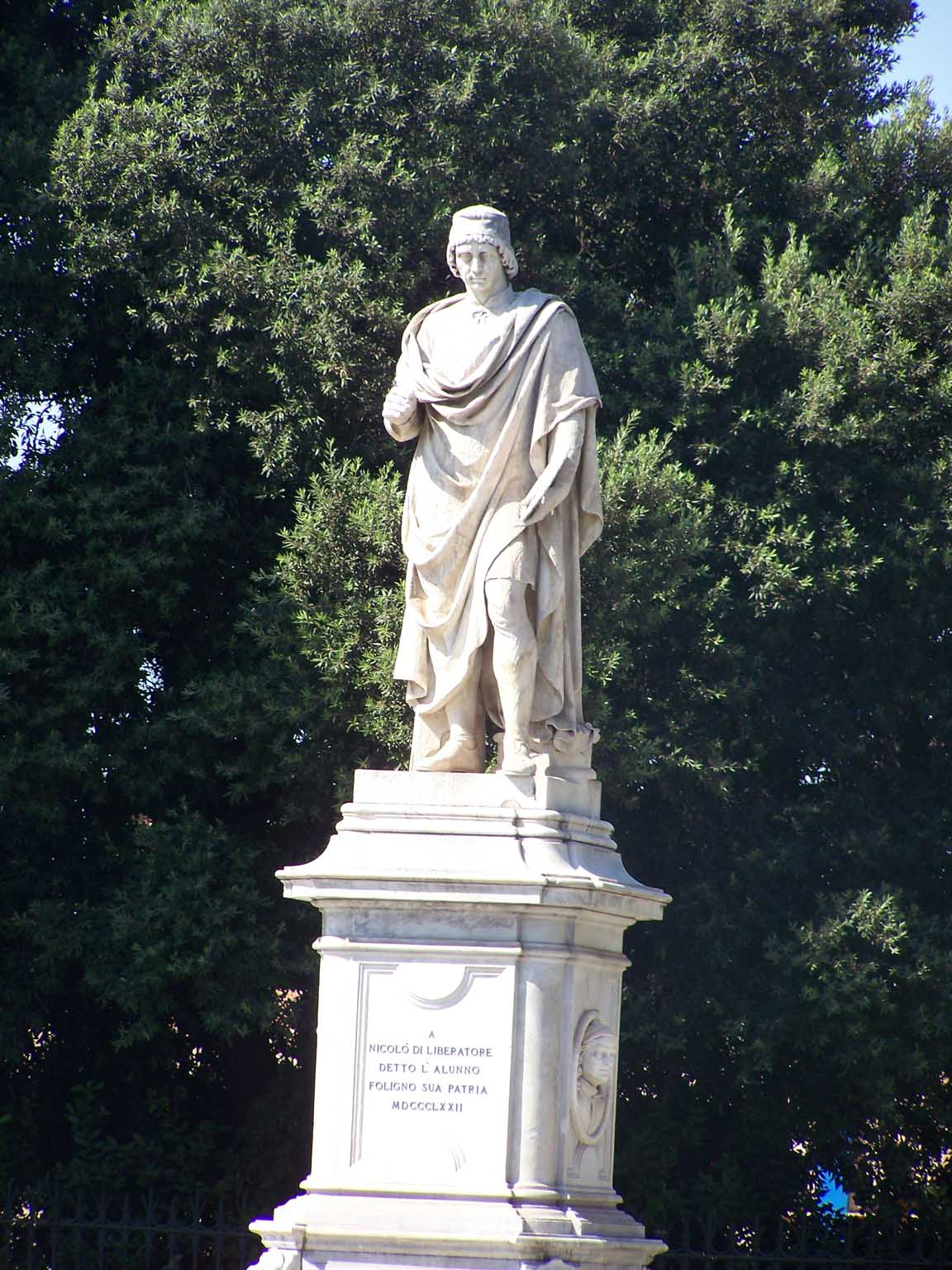 Foligno, Monumento a Nicolò Alunno